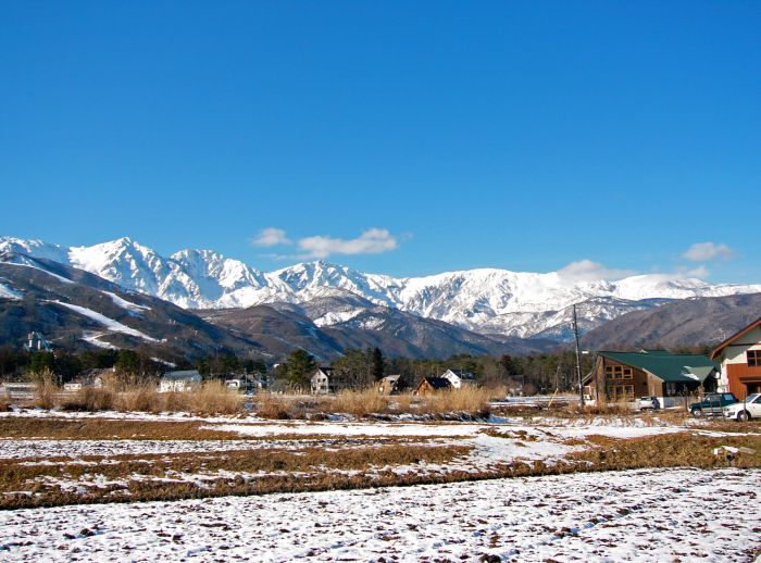 長野県北安曇郡白馬村のオリンピック道路から見た白馬三山